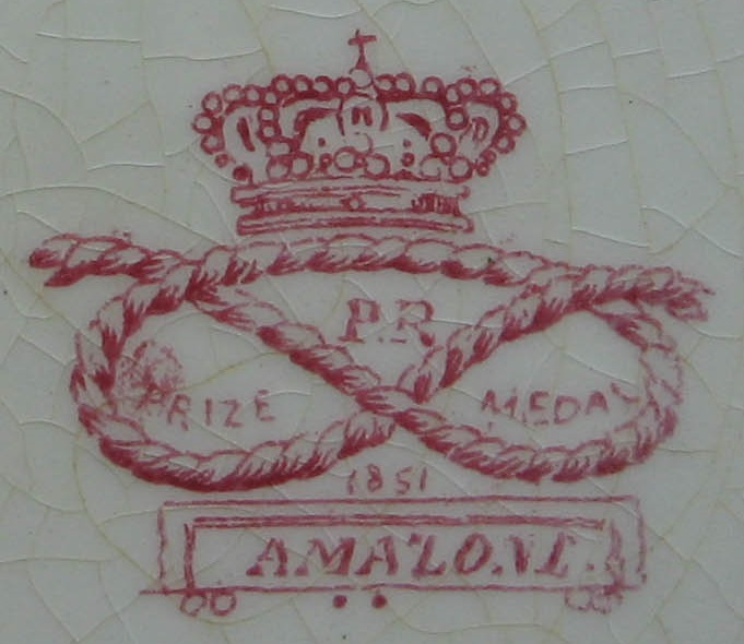 Polling 20